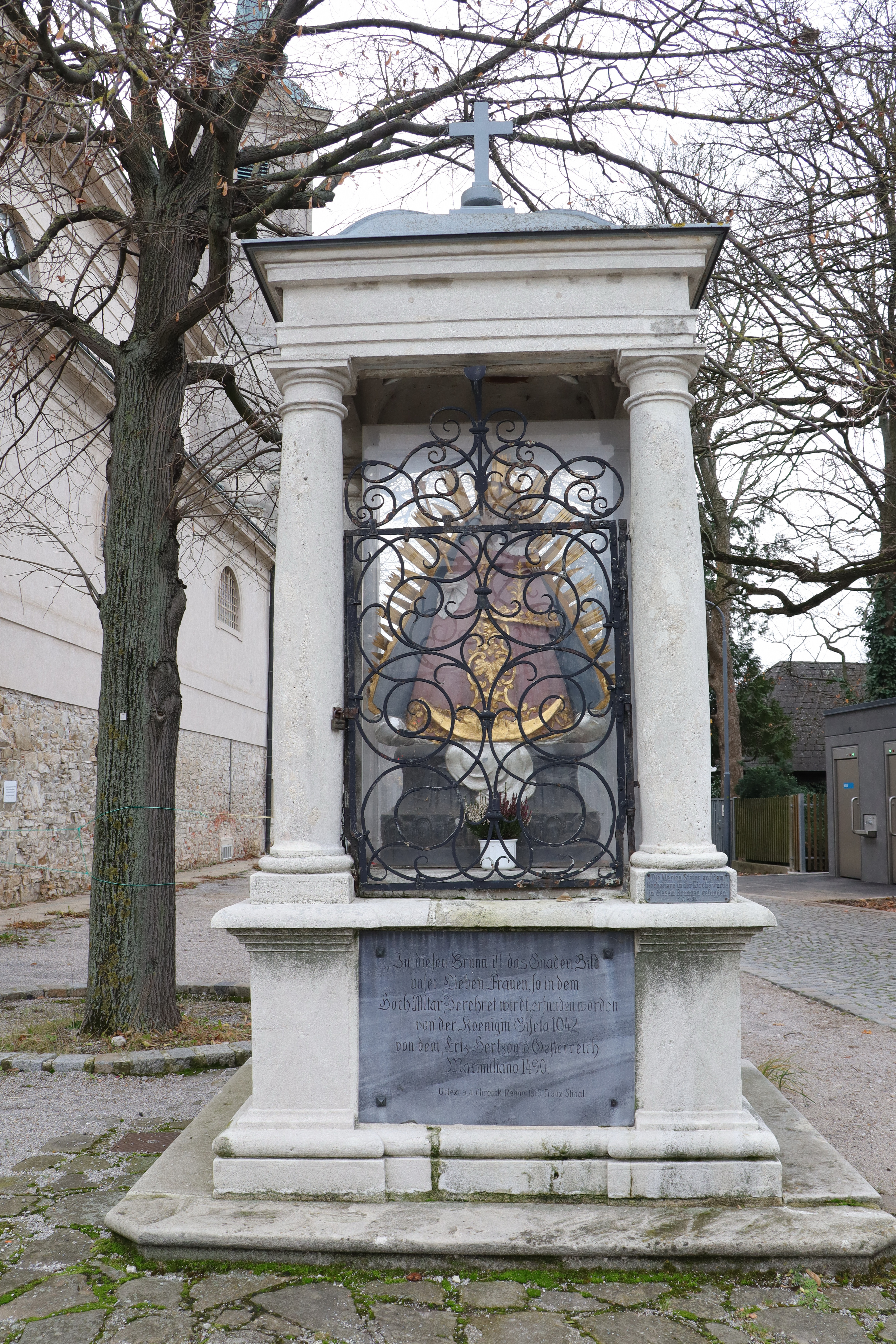 Brunnen mit Marienstatue bei der Kirche Marienbrunn 1140 Wien Inschrift am Sockel: "In diesen Brunn ist das Gnaden Bild unser Lieben Frauen, so in dem Hoch Altar Verehret wirdt, erfunden worden von der Koenigin Gisela 1042 von dem Ertz Hertzog v. Oesterreich Maximiliano 1490. Urtext a. d. Chronik Renov. 1925 Franz Stindl"